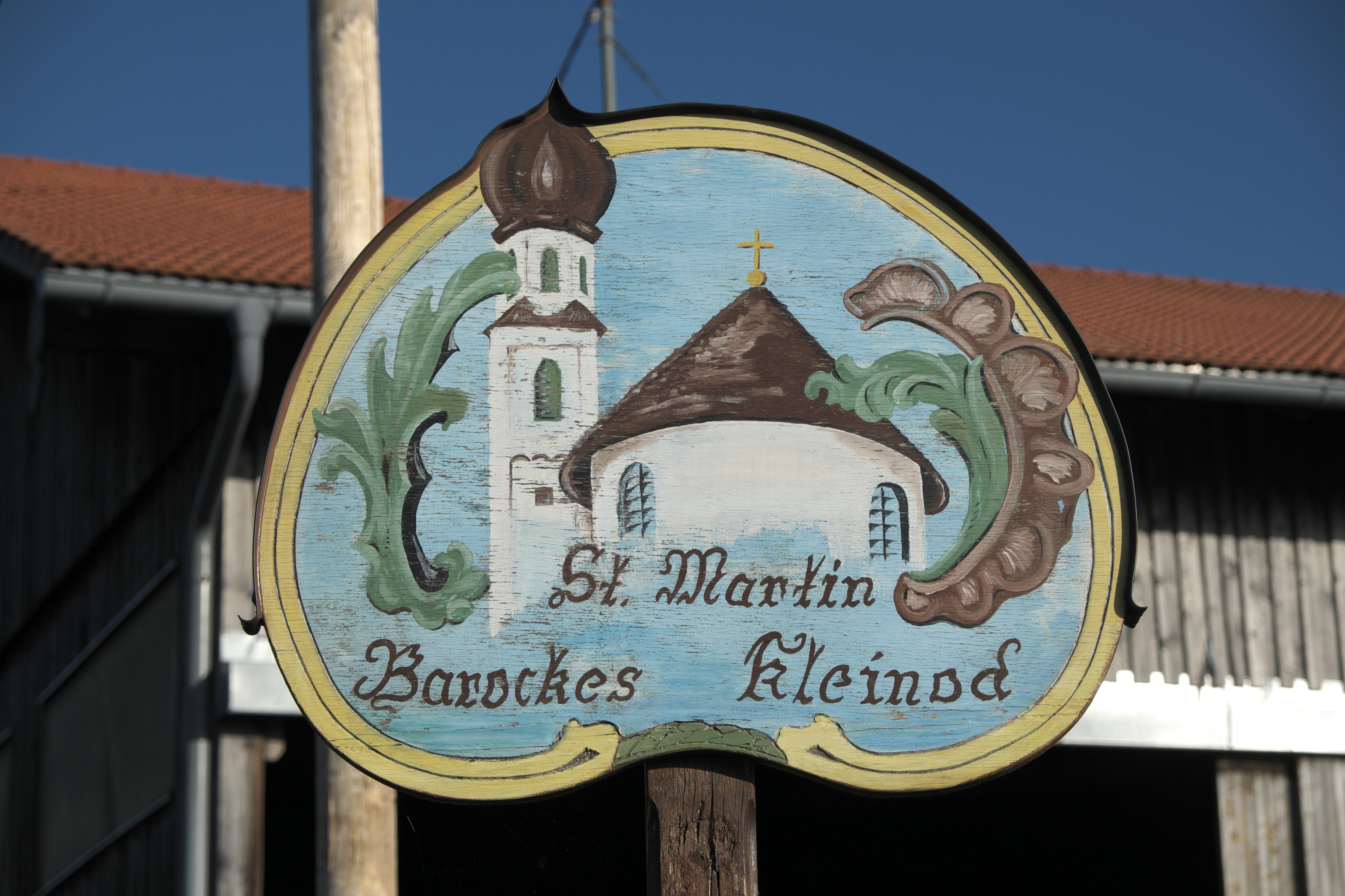 Begrüßungsschild in Sachsenried (Schwabsoien) im Landkreis Weilheim-Schongau (Bayern/Deutschland) mit Darstellung der Pfarrkirche St. Martin